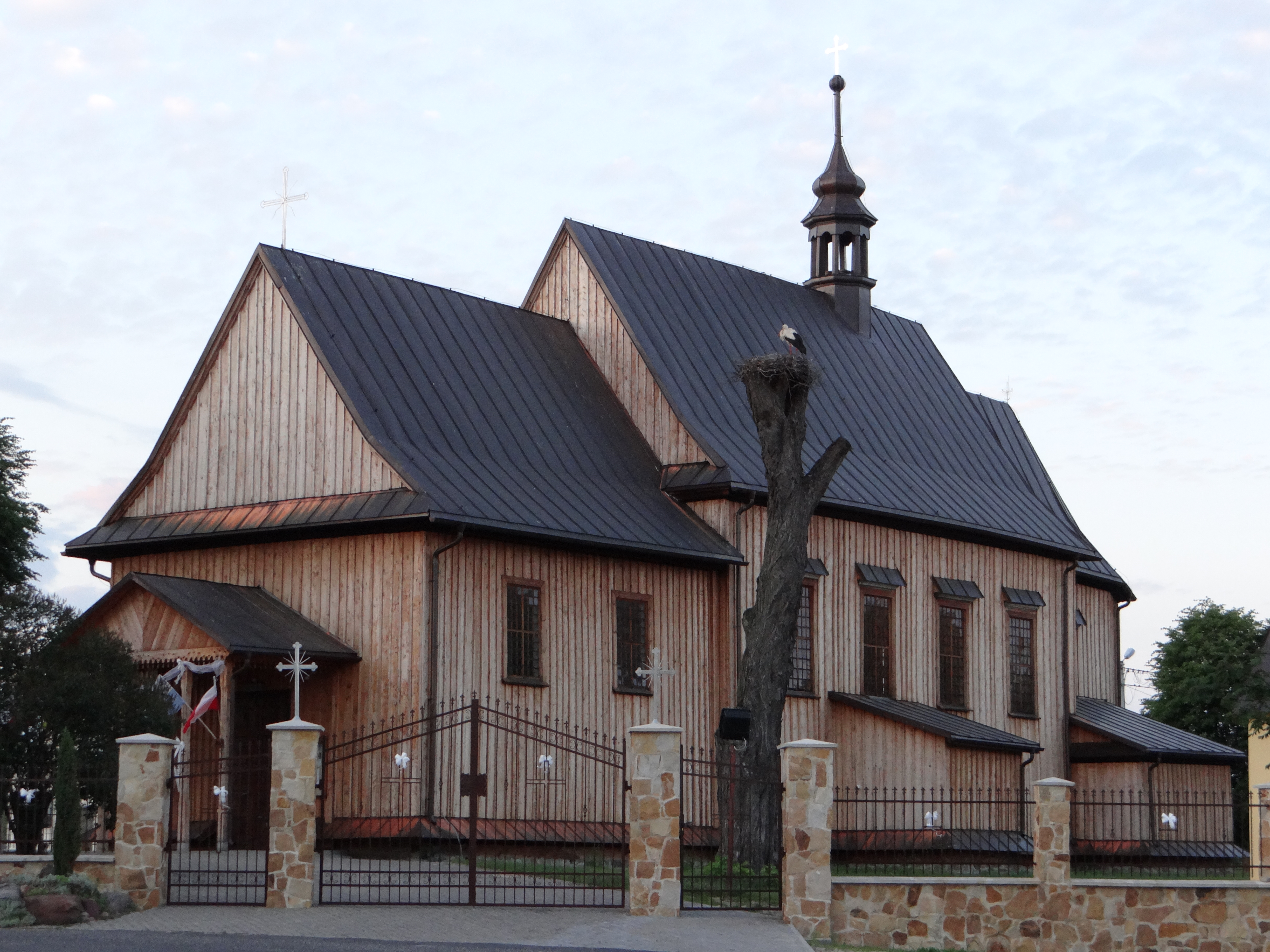 Zabytkowy kościół w Hucie Krzeszowskiej.